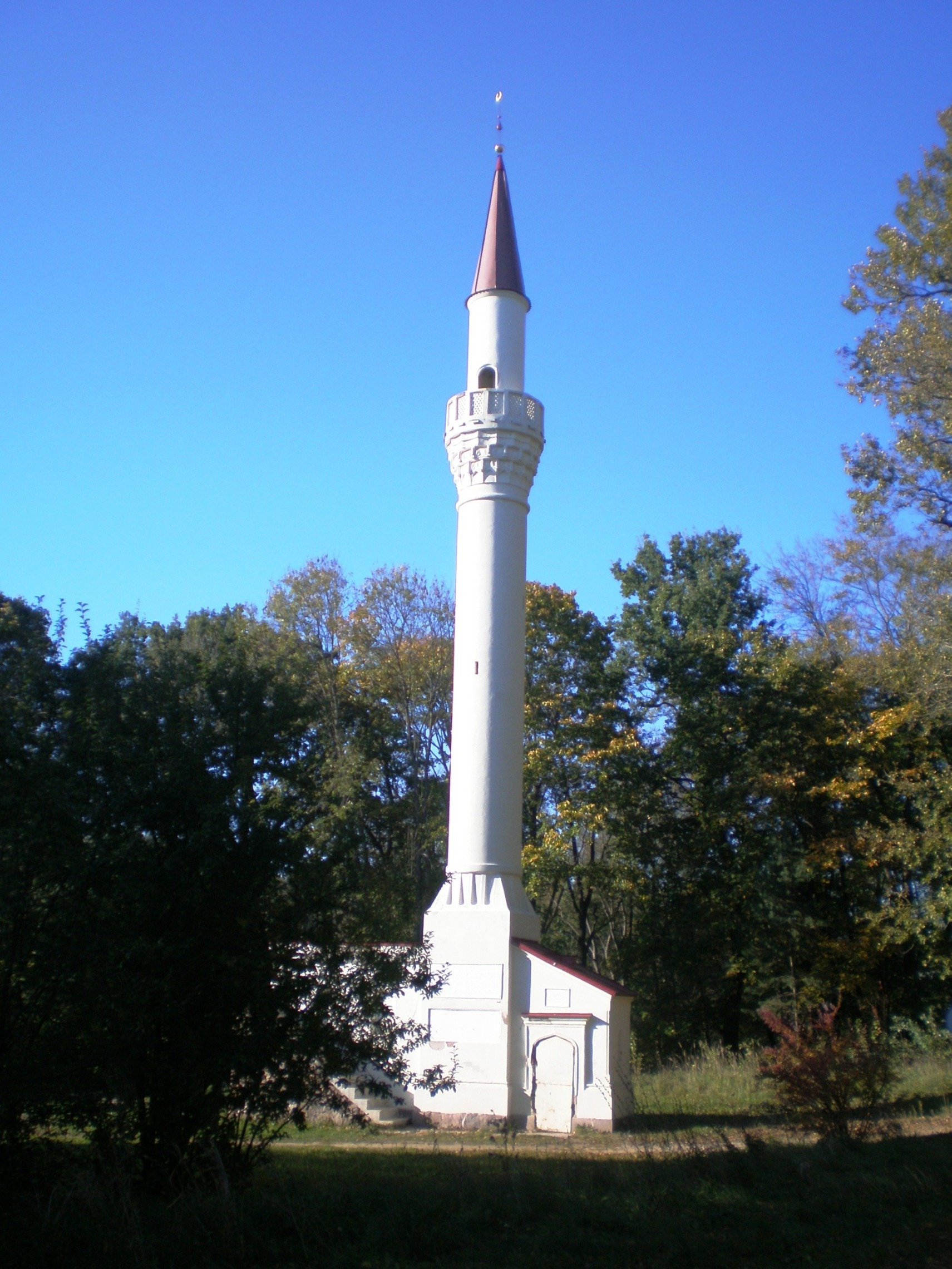 Kėdainių minaretas